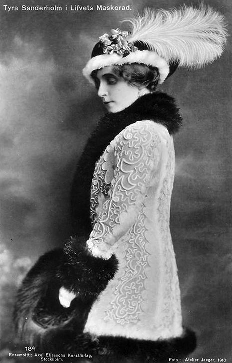 Tyra Zanderholm